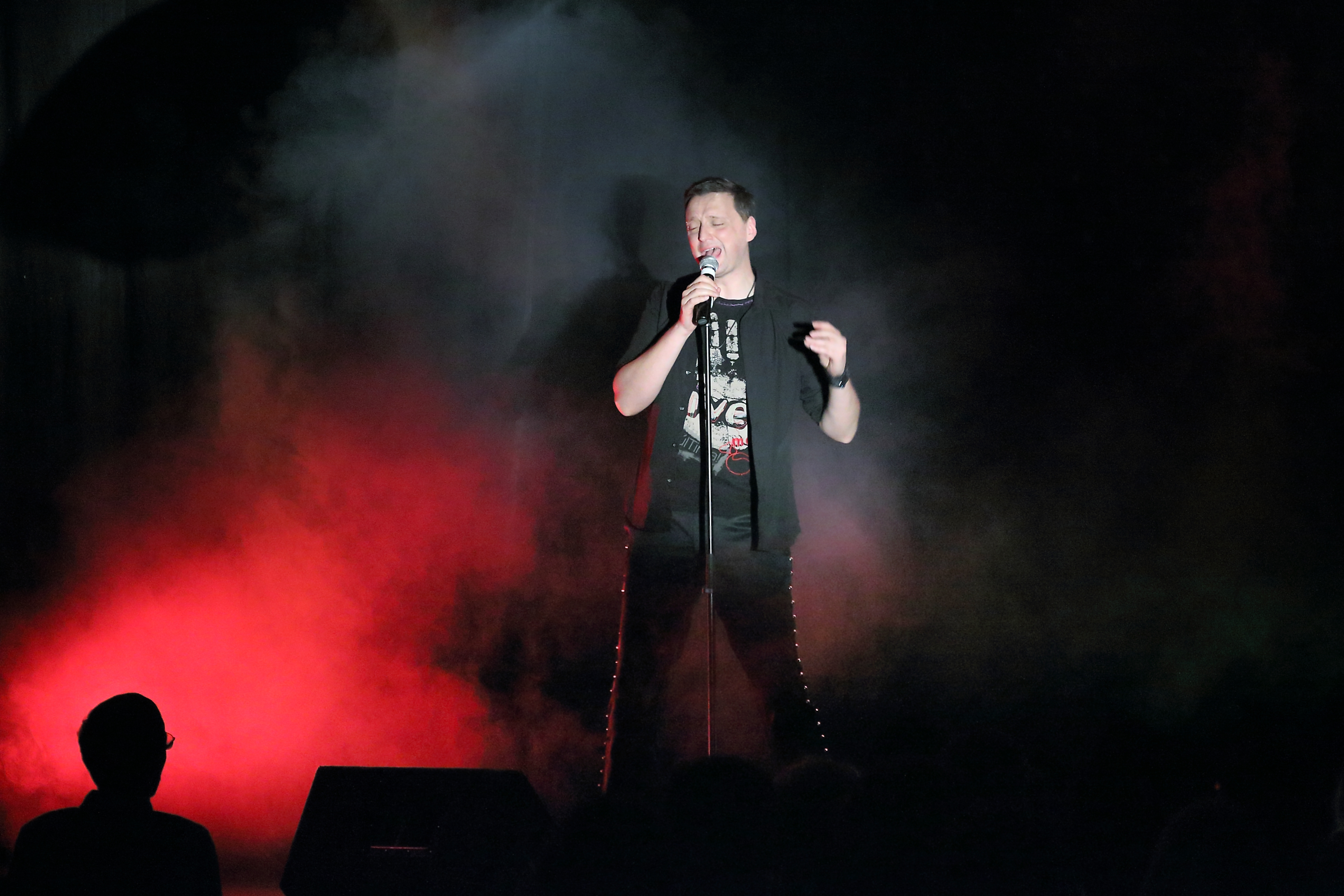 Comedian Ole Lehmann bei einem Auftritt am 23.01.2014 in Heidenheim an der Brenz